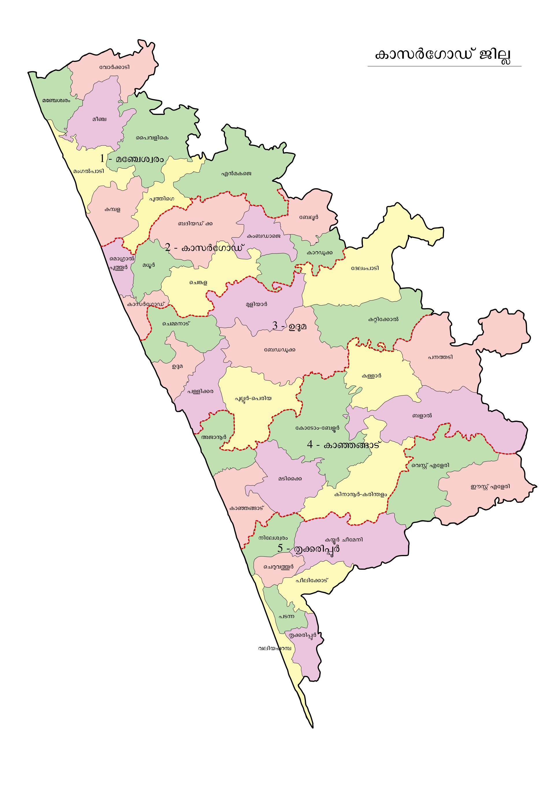 കാസർഗോഡ് ജില്ലയുടെ മാപ്പ്, പഞ്ചായത്തുകൾ, മുനിസിപാലിറ്റികൾ, മണ്ഡലങ്ങൾ എന്നിവ രേഖപ്പെടുത്തിയിരിക്കുന്നു. വിക്കിപീഡിയയ്‌ക്കു പുറത്തുള്ള ഉപയോഗങ്ങൾക്ക് .png ഫോർമാറ്റിലുള്ള മാപ്പ് ഉപയോഗിക്കാവുന്നതാണ്.